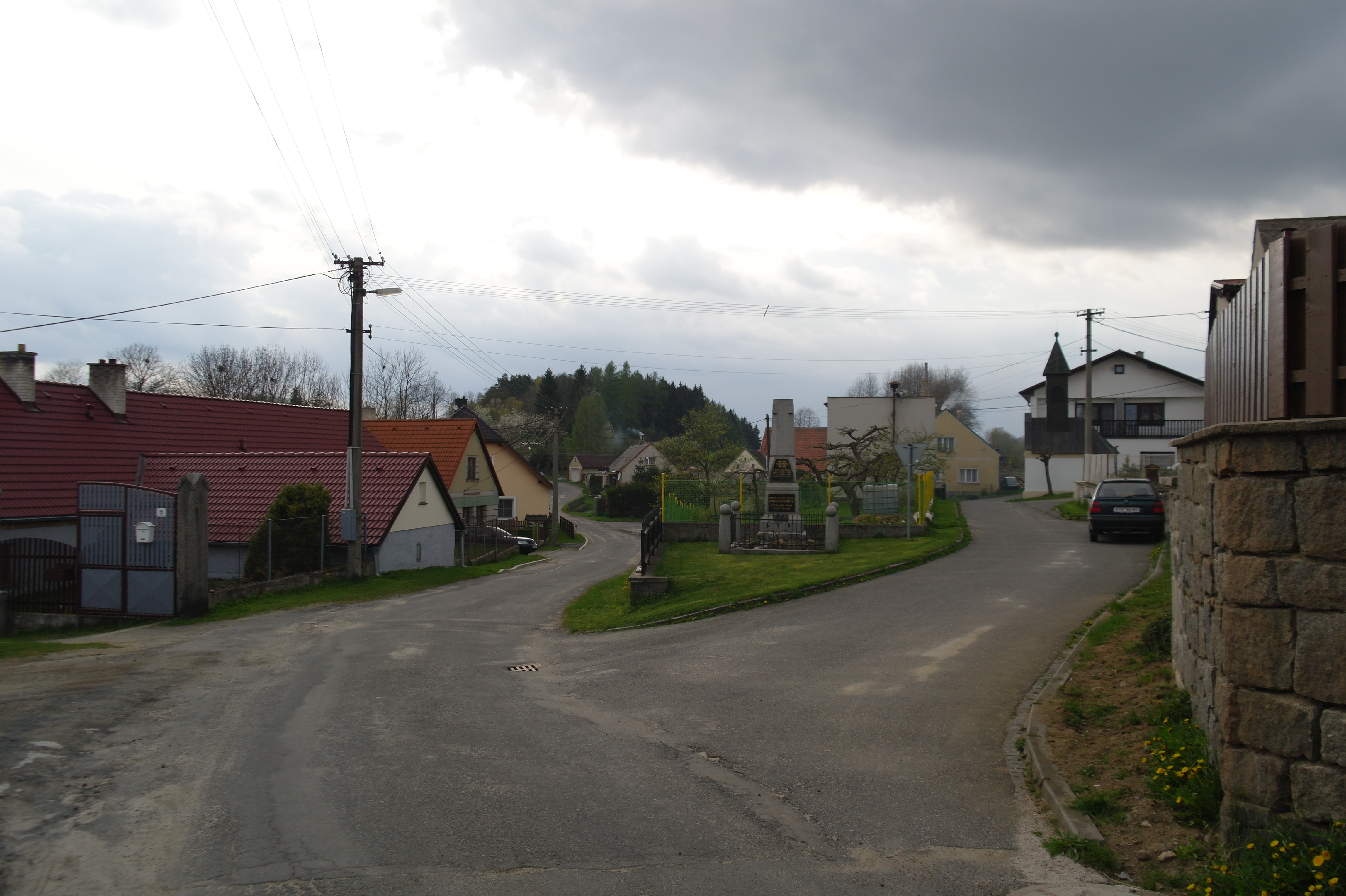 Tužice